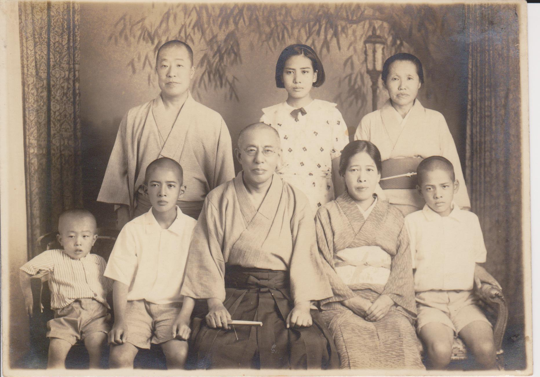 藤井恵照家族